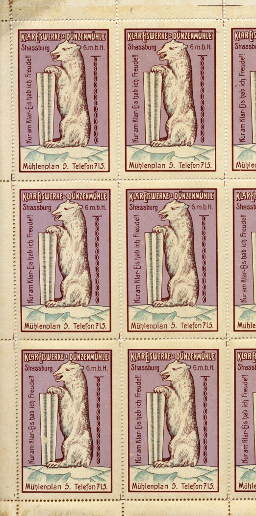 Eiswerbung der Klareiswerke Dünzenmühle in Straßburg